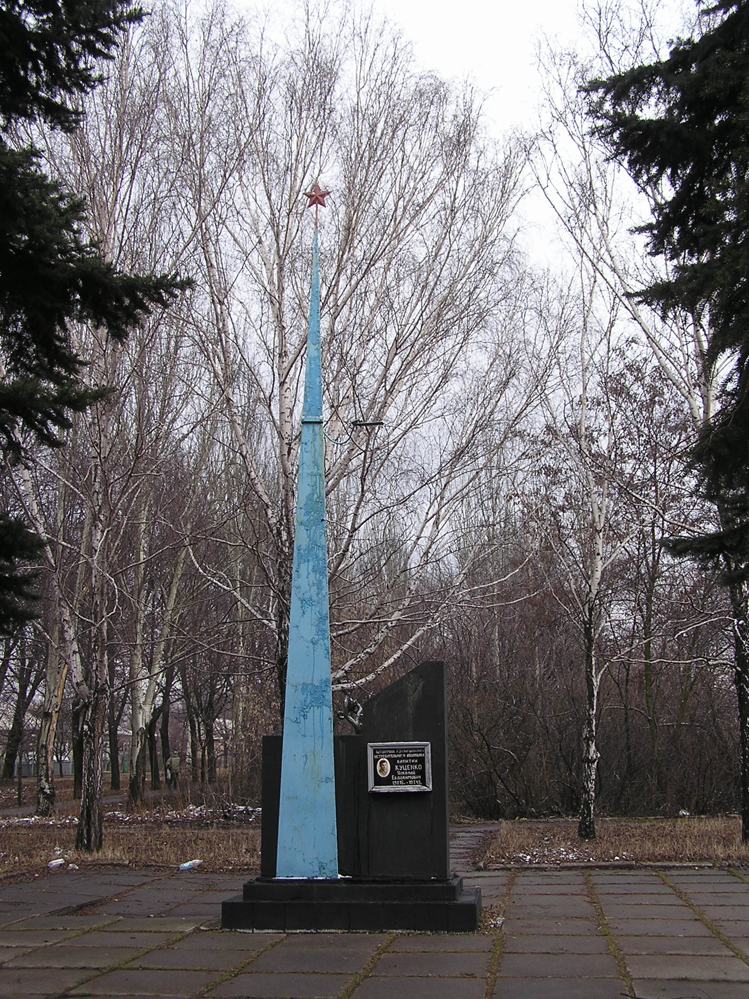 Донецк. Памятник куценко